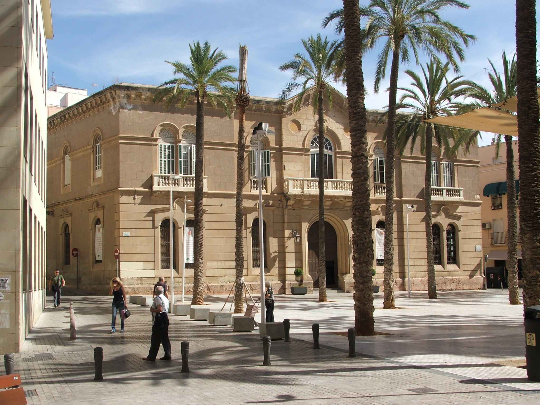 Fotografía de la fachada principal del Palacio Episcopal de Almería, Andalucía, España.